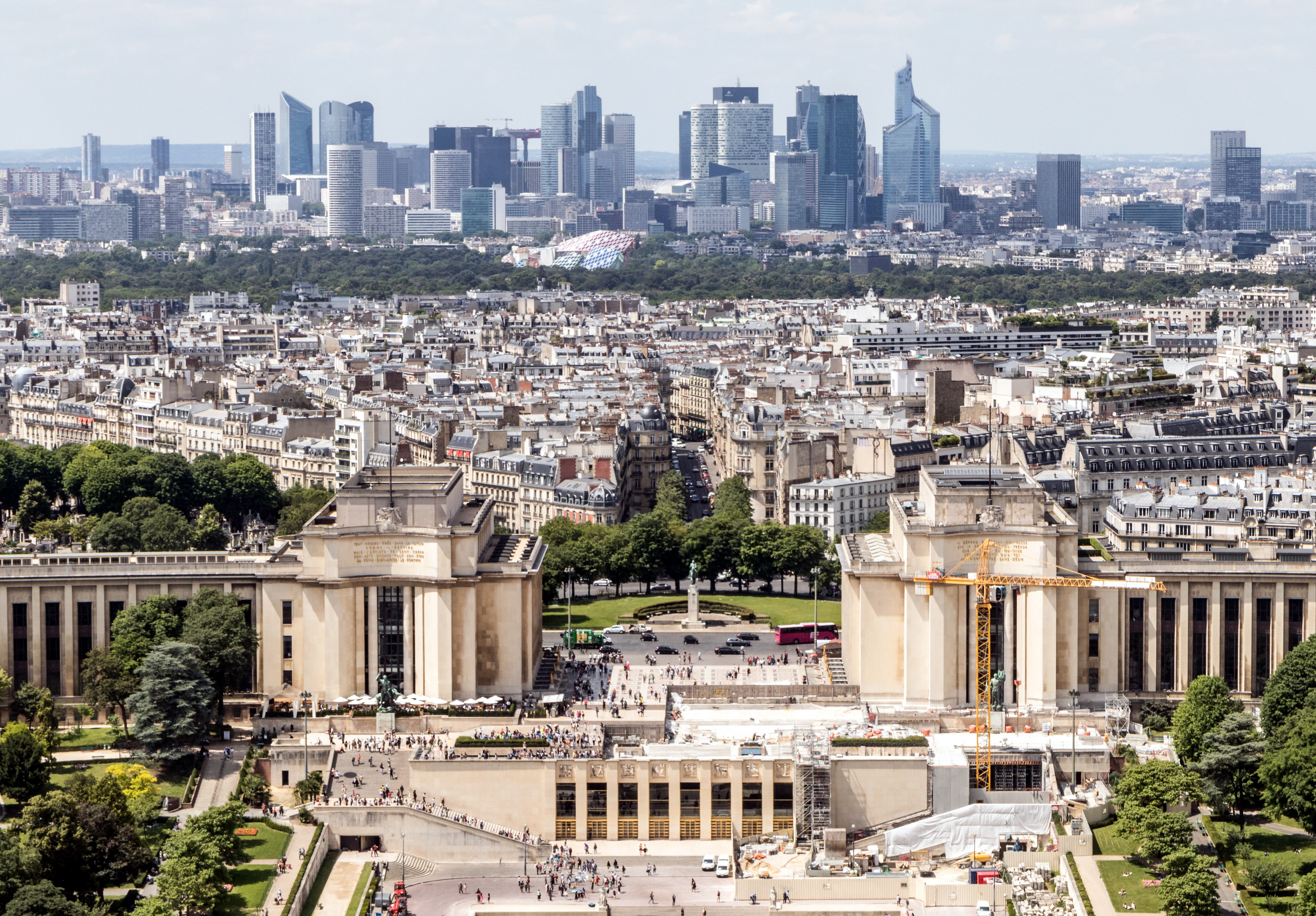 Trocadéro and La Défense